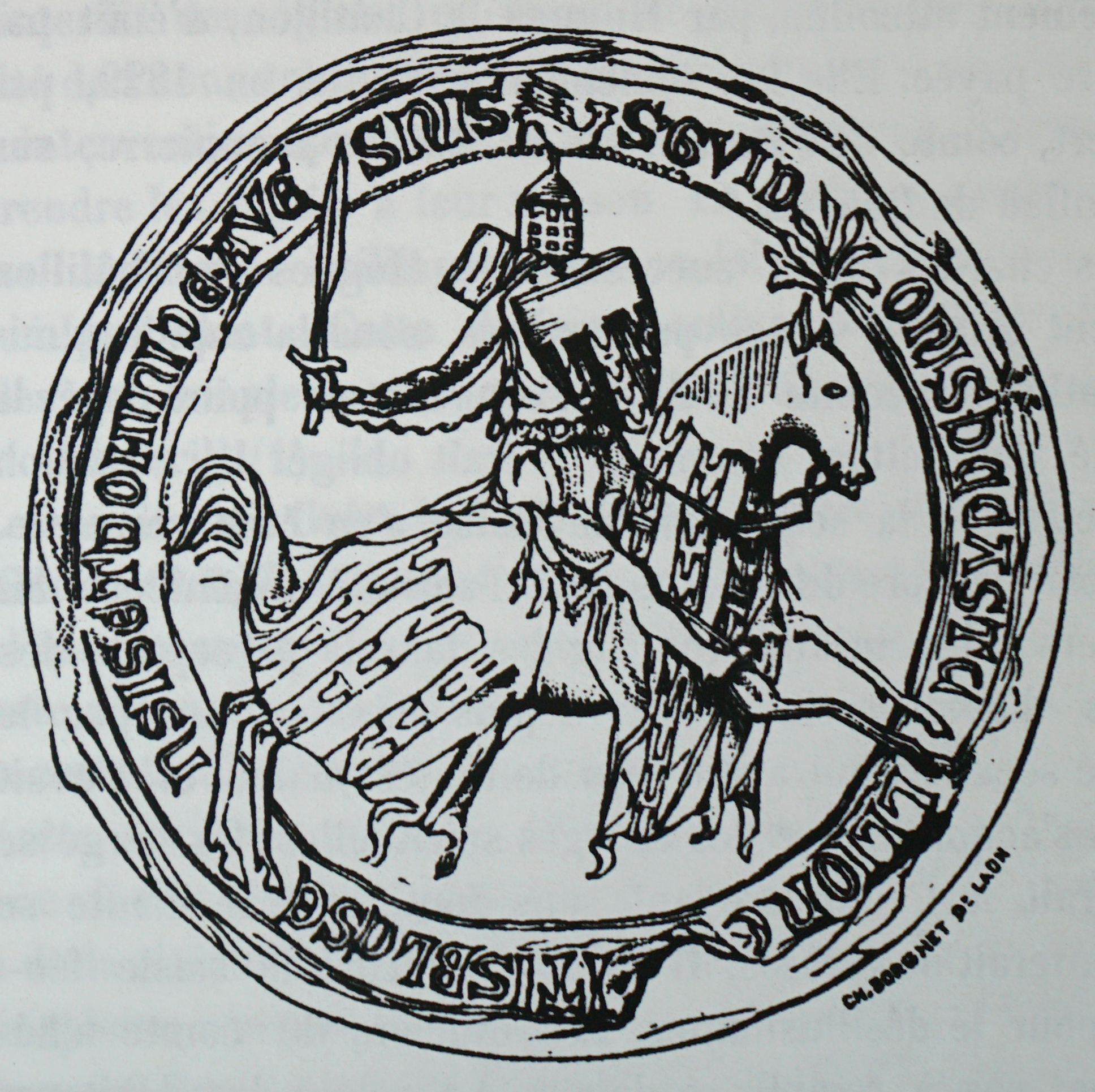 relevé d'un sceau médiéval.